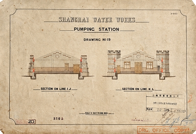 杨树浦水厂图纸